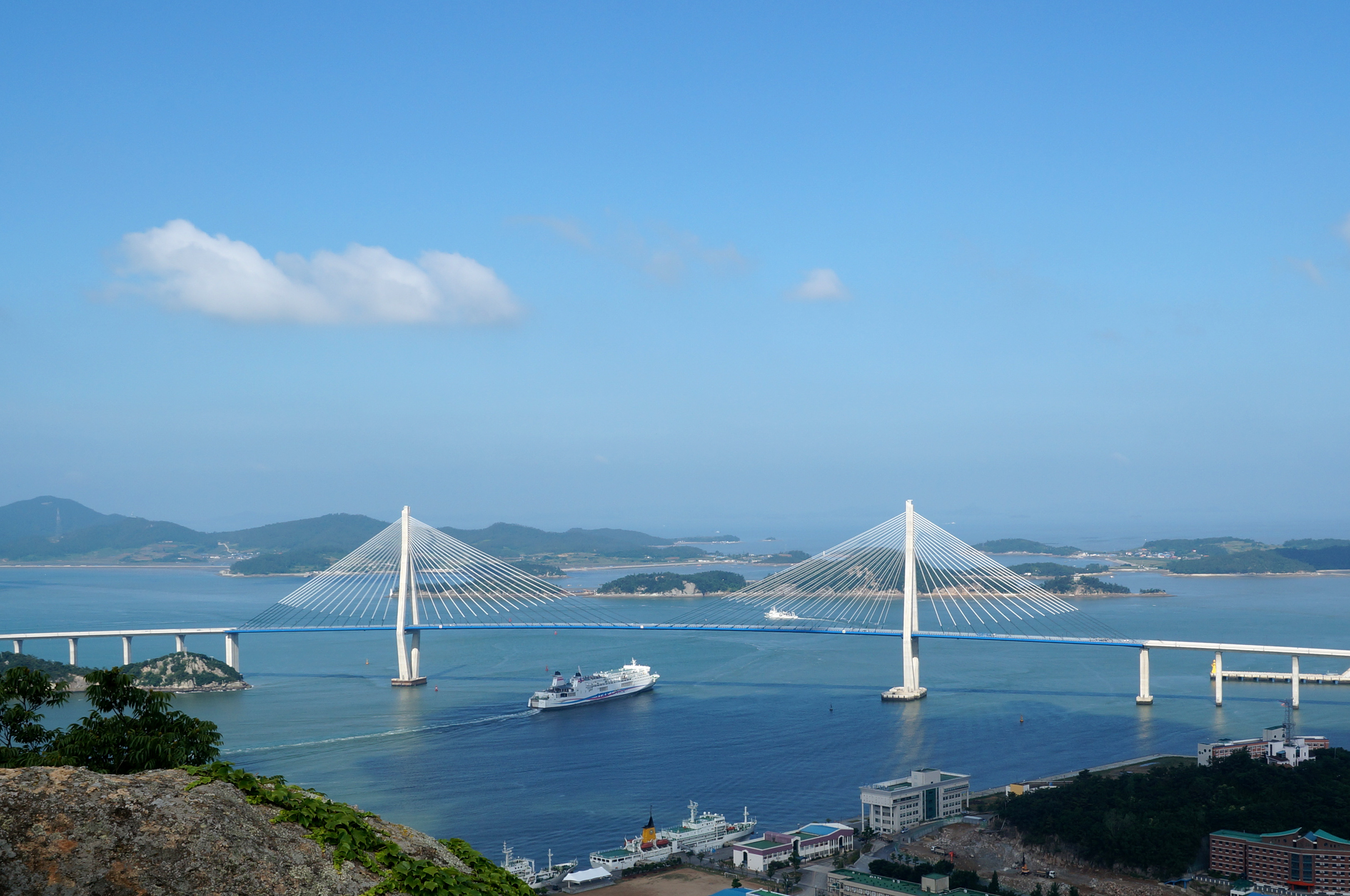 목포대교 / Mok po bridge